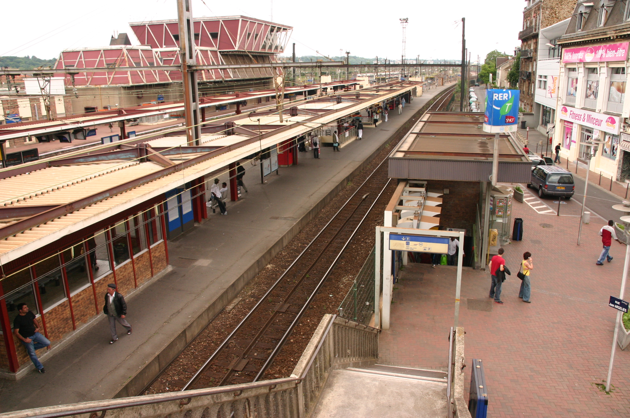 Gare de Juvisy, Juvisy-sur-Orge , département l'Essonne, France